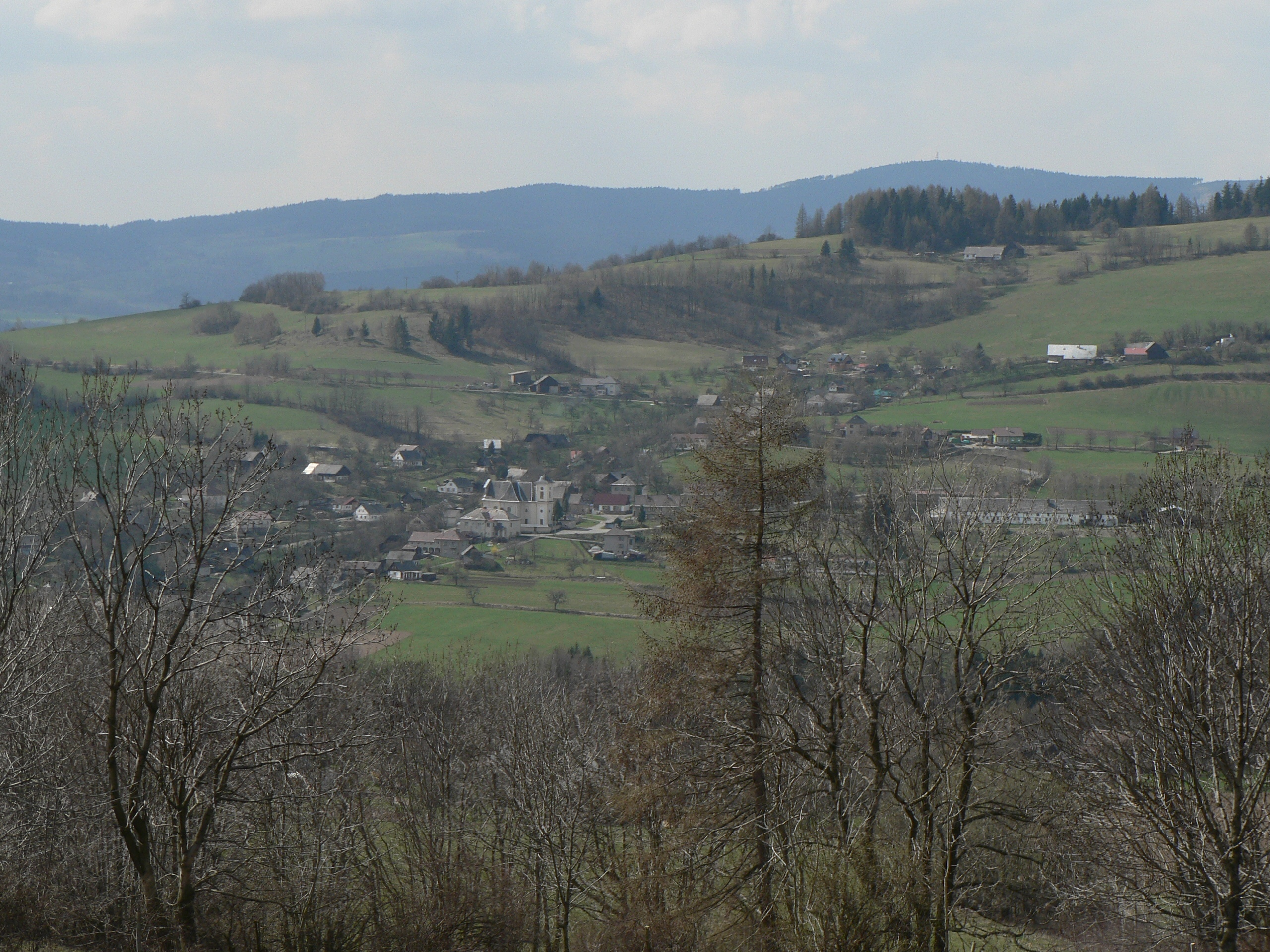 Jakubovice, pohled od východu